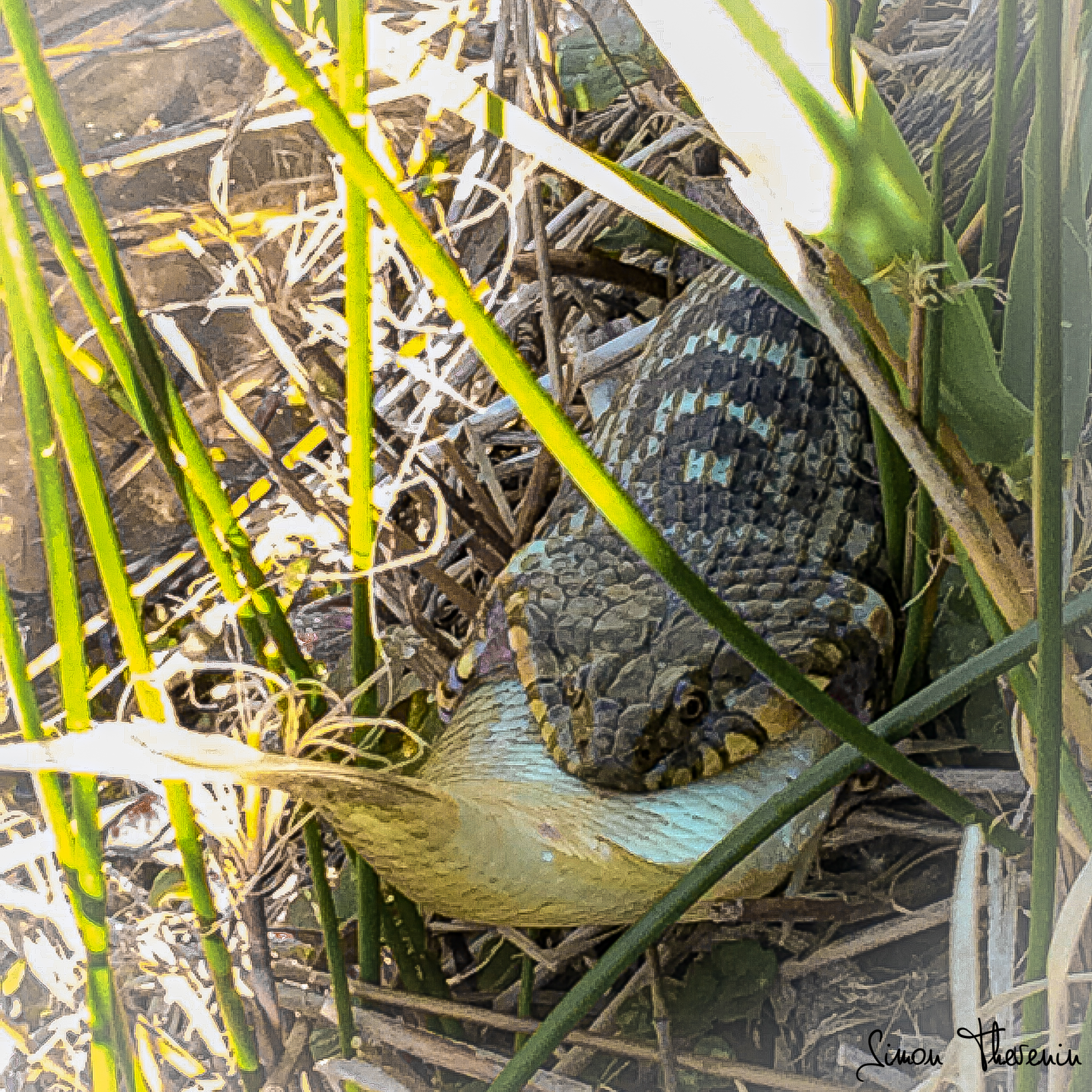 Cliché d'une Couleuvre vipérine (Natrix maura) mangeant un poisson au bord d'un étang, pris par Simon Thevenin à Cadenet en 2017